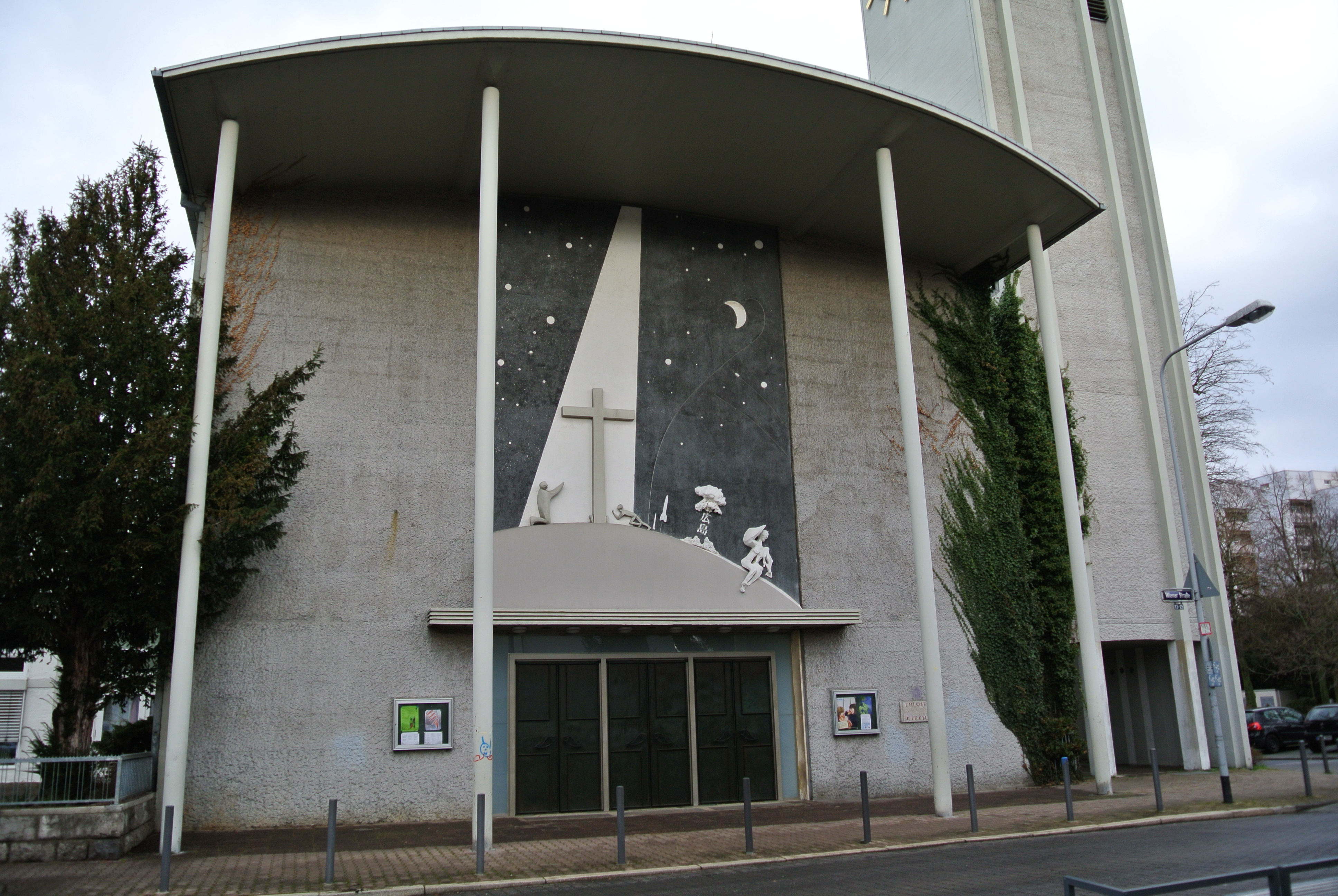 Erlöserkirche in Frankfurt-Oberrad von Alfred Schild, 1956, Südportal